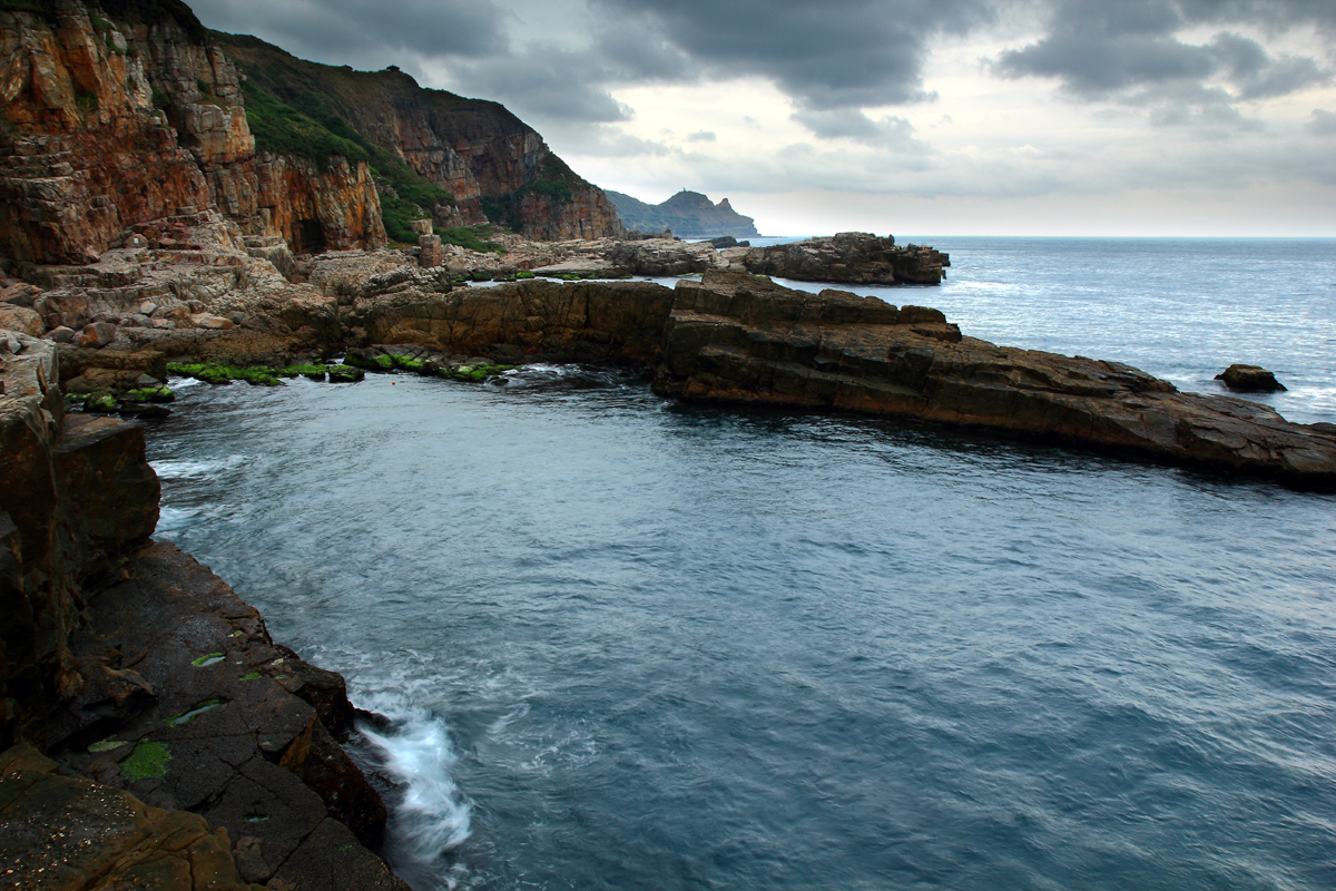 Long Tong Coast (龍洞岬)